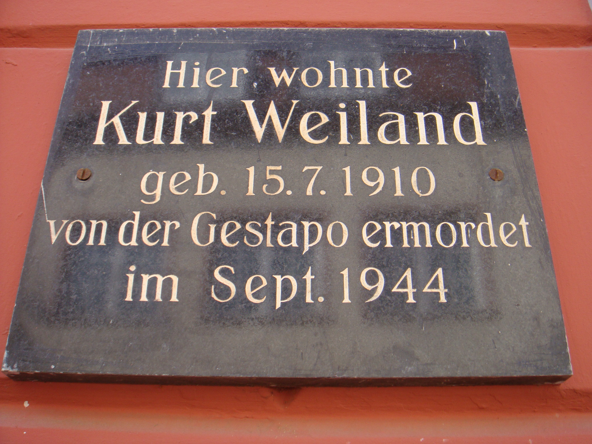 Gedenktafel für Kurt Weiland an seinem Wohnhaus Königstraße 7, Apolda